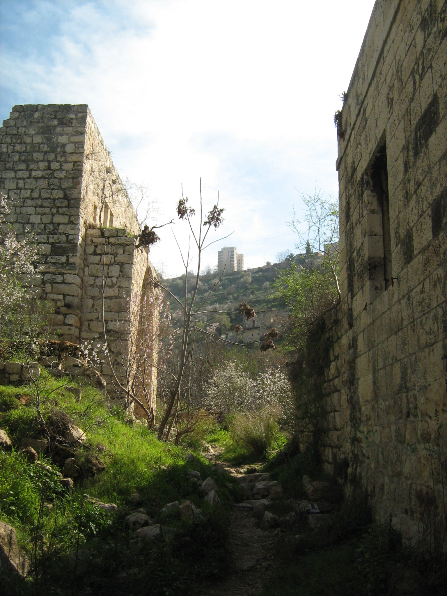 Lifta